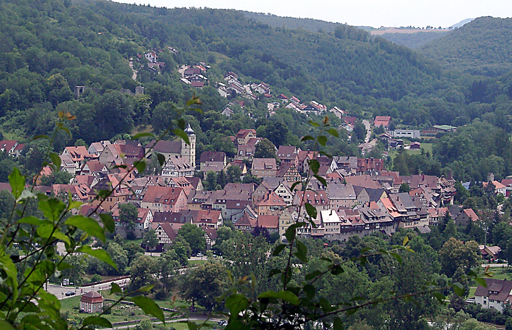 Forchtenberg von oben